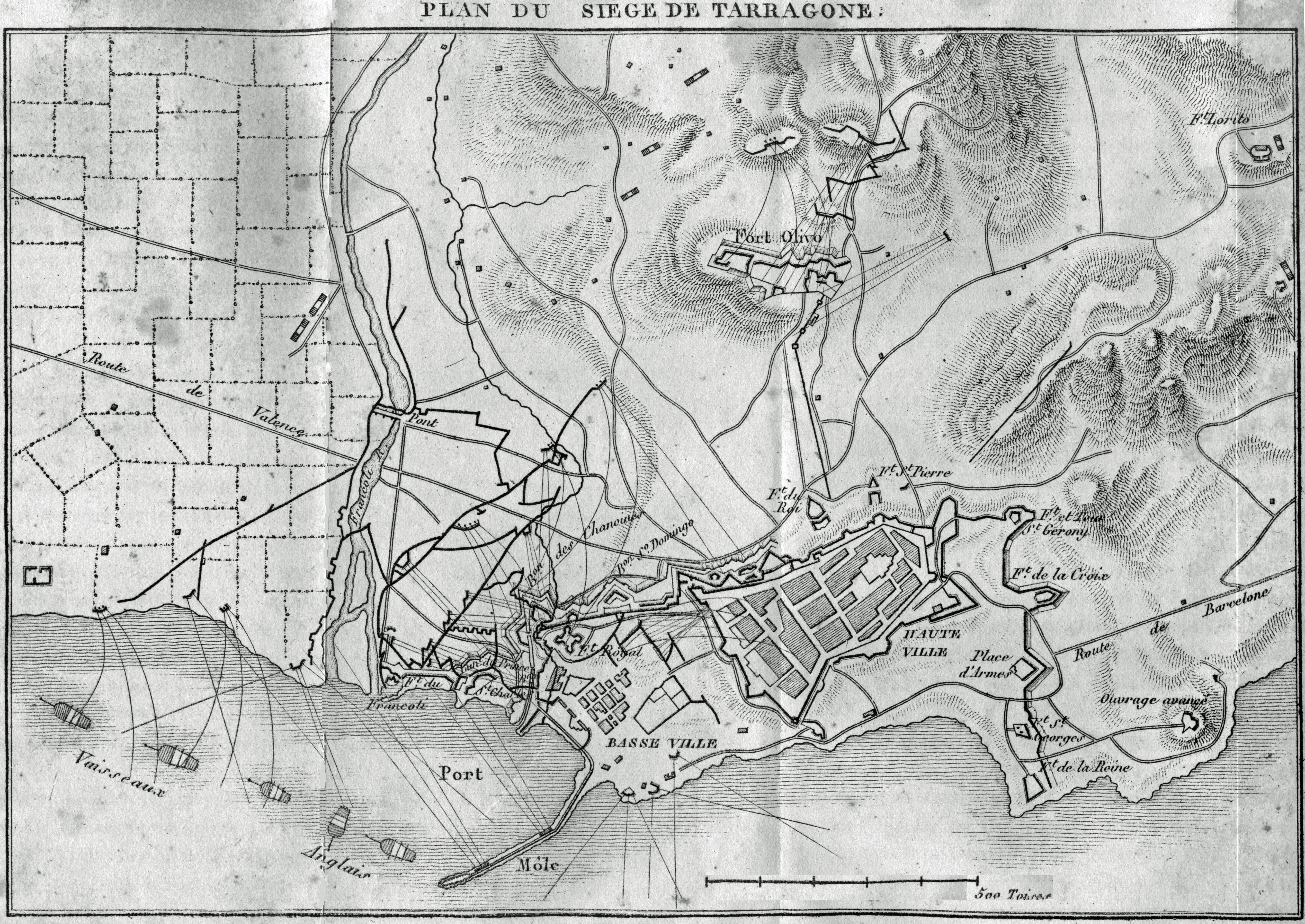 plan du siège de Tarragone dans la tome 11 .